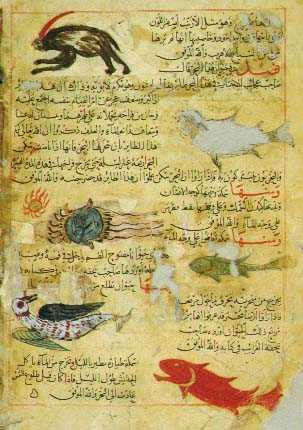 Arabic manuscript in zoology.